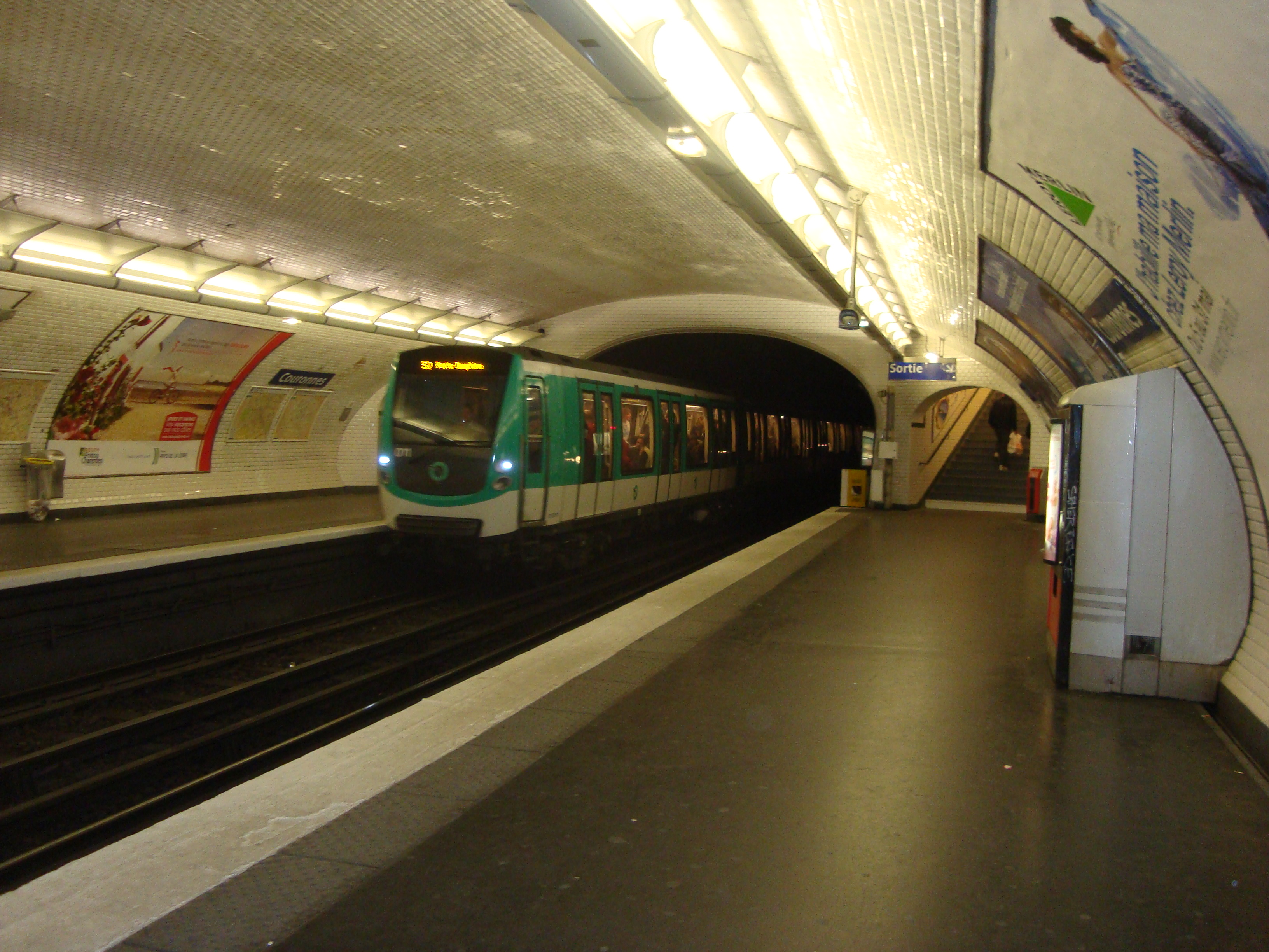 Rame qui arrive à la station Couronnes.